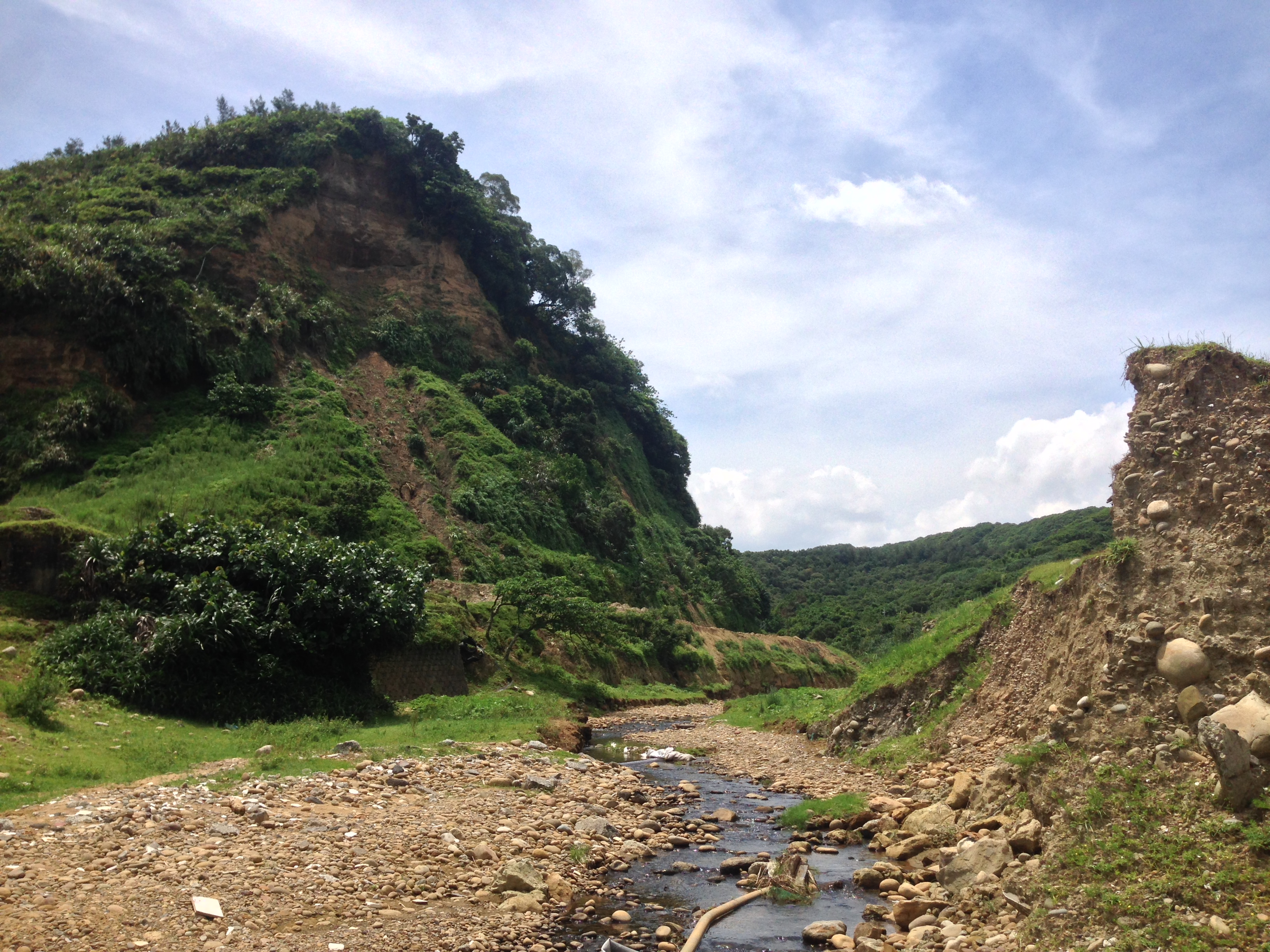 中文（台灣）: 林口大峽谷嘉寶溪